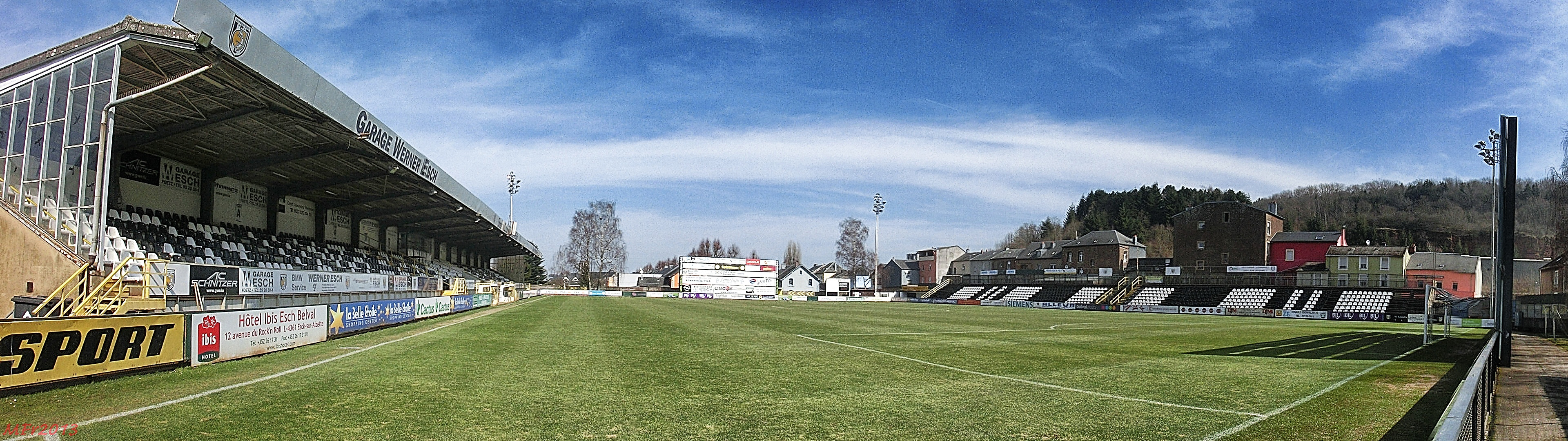 Innenansicht des Stadions Op der Grenz in Esch an der Alzette. Heimat von Jeunesse Esch